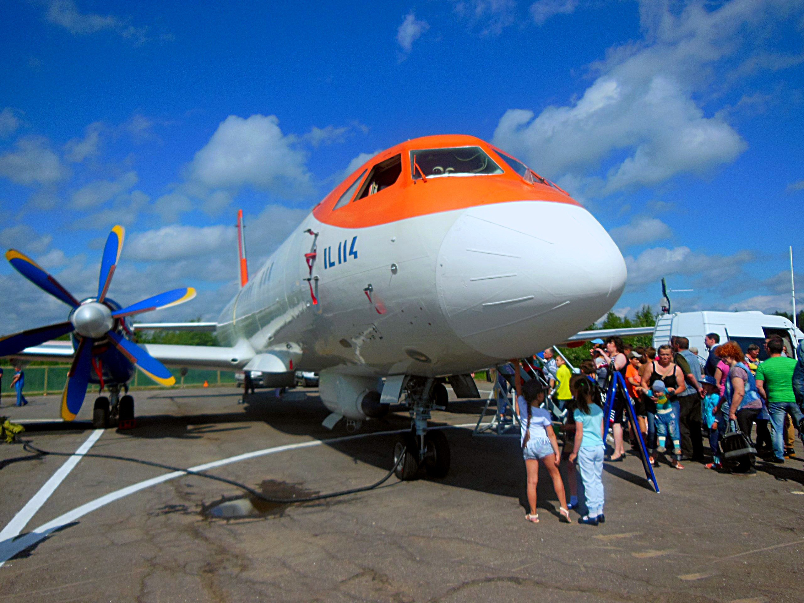 Ил-114 на аэродроме МЧС России "Вытегра